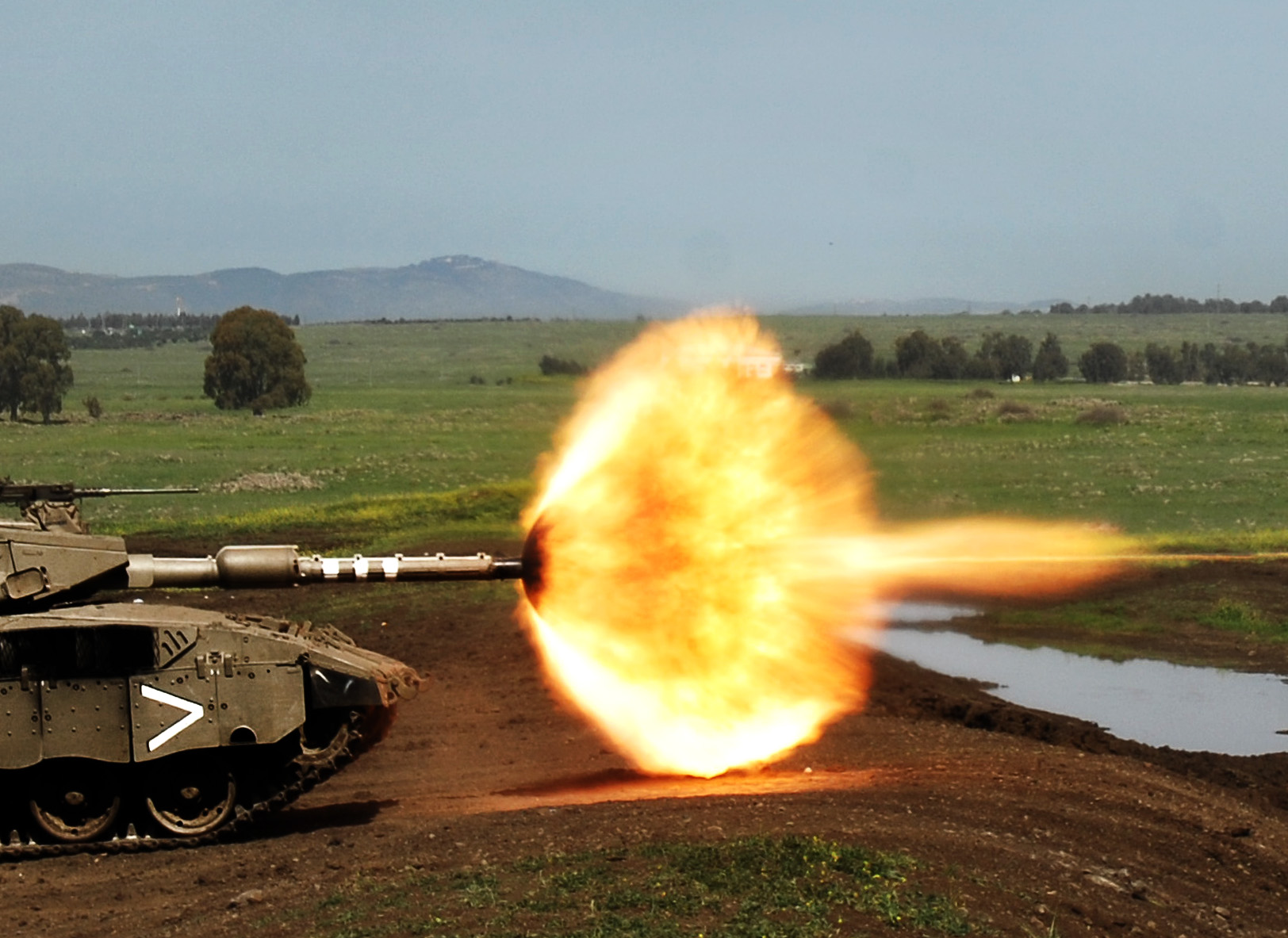 March 20, 2008. A tank during a training day held in the Golan Heights for the 188th Armored Brigade. The goal of the day was to test the level of the brigade's combat fitness. Photography by Neil Cohen, IDF Spokesperson's Film Unit. יום חמישי התקיים יום כשירויות ברמת הגולן של חטיבת ברק. במהלכו התחרו גדודי החטיבה במקצועות השריון השונים. מטרת היום הייתה לבדוק את רמת הכשירות והמוכנות של החטיבה. צולם על ידי ניל כהן, יחידת ההסרטה, דובר צה"ל.